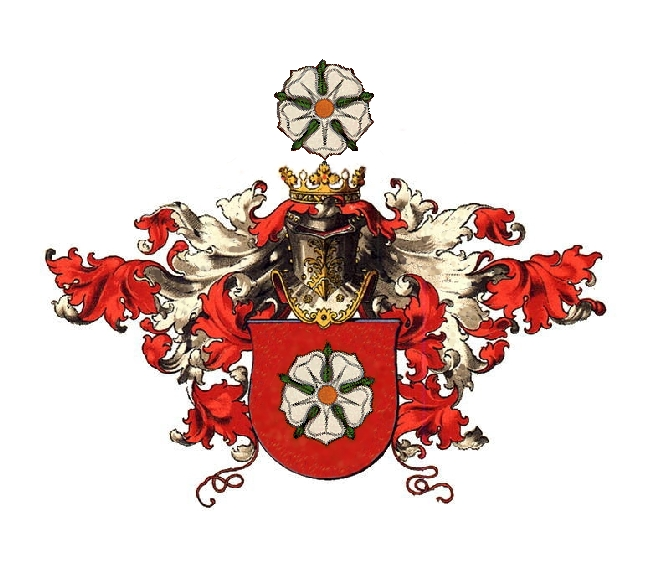 Herb rodowy niecieckich